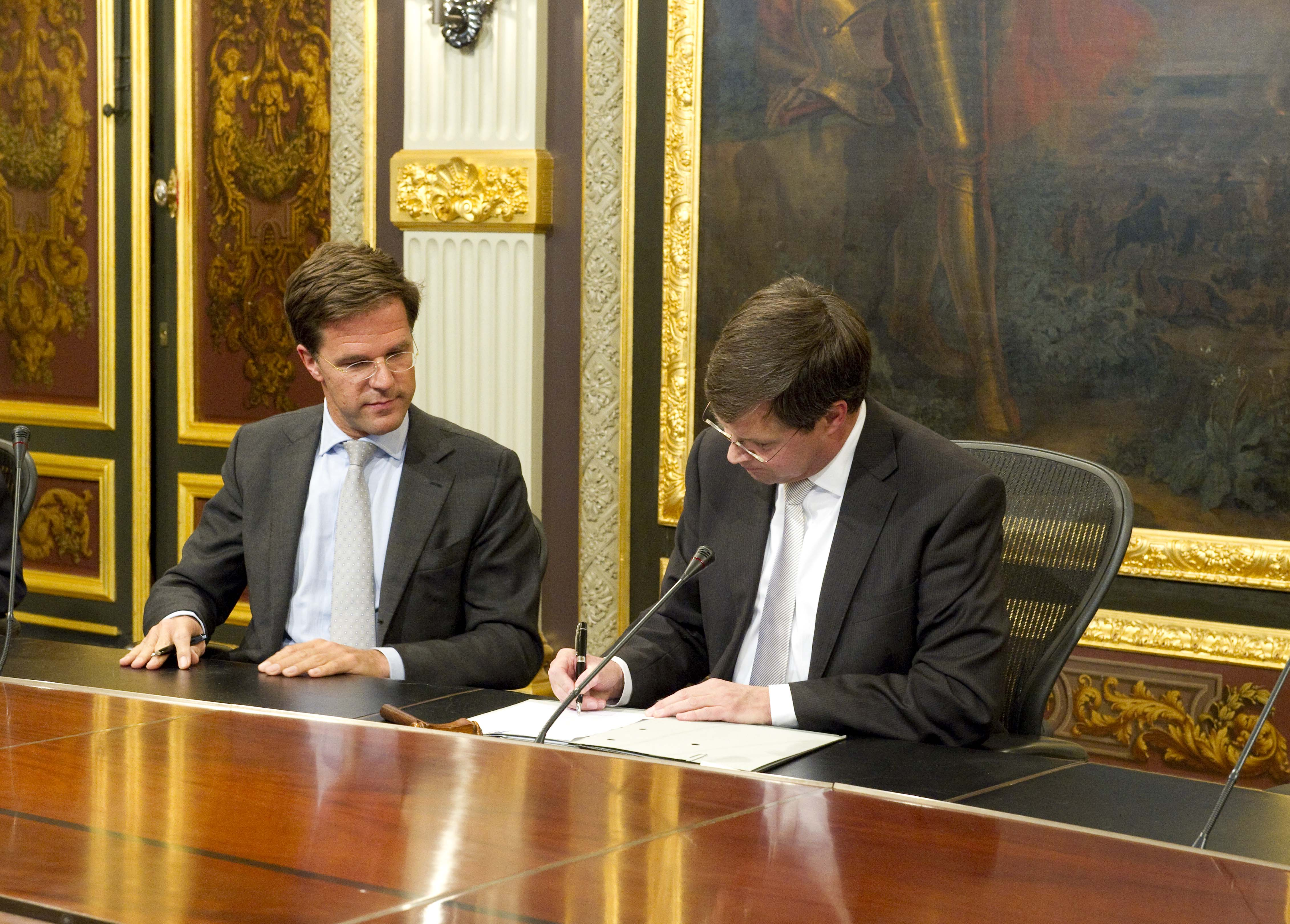 14/10/10: Scheidend premier Balkenende tekent in het bijzijn van Mark Rutte voor de officiële portefeuilleoverdracht